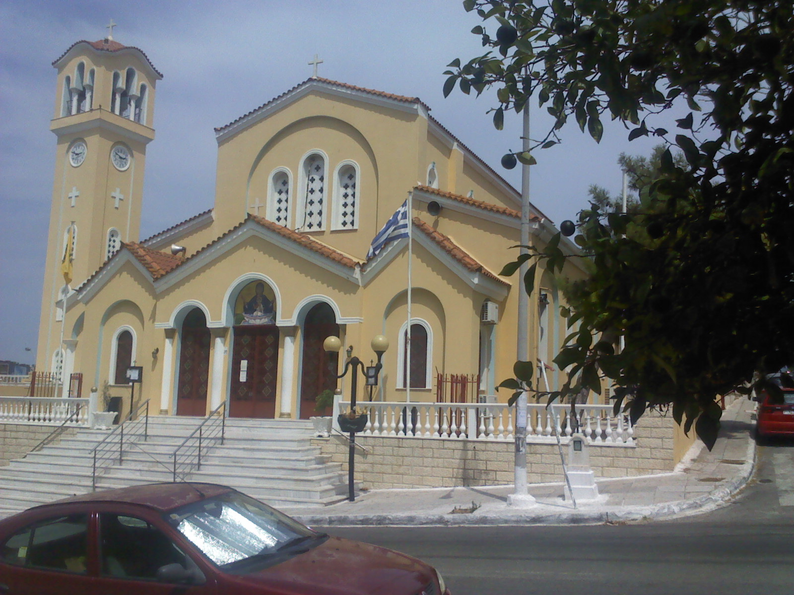 Temple Zoodoxos Pigi Xatzikiriakeio